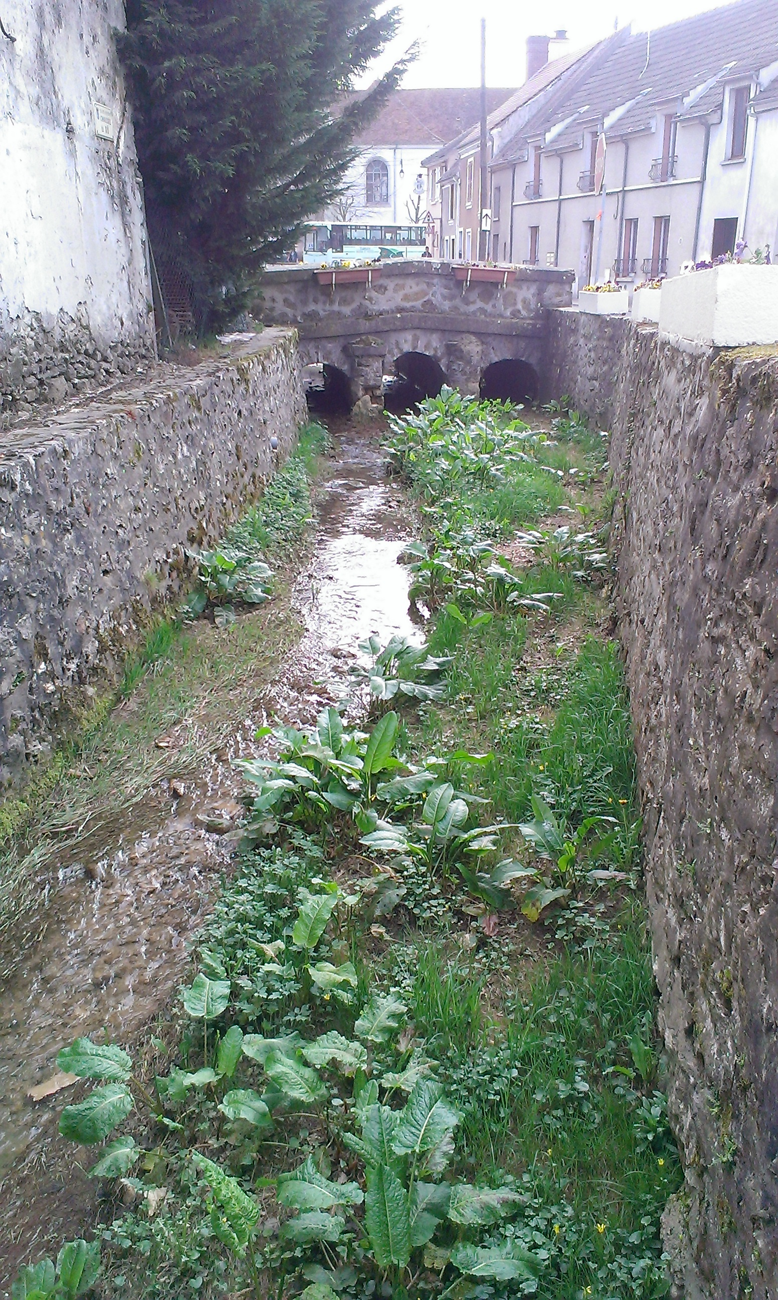 Grand Ru, à Villiers sur Morin (77)